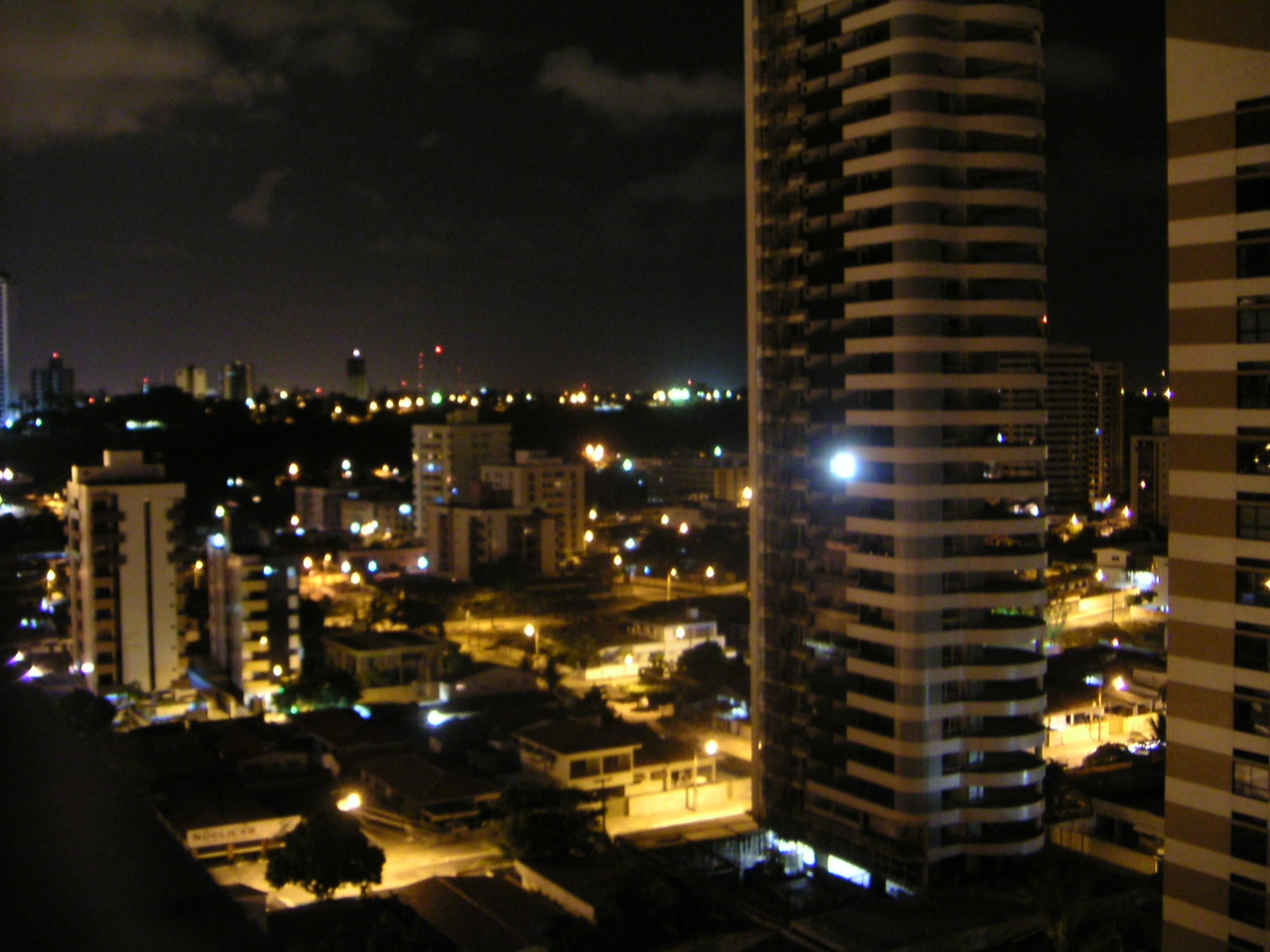 João Pessoa (Paraíba), Brazil. Manaíra Beach.